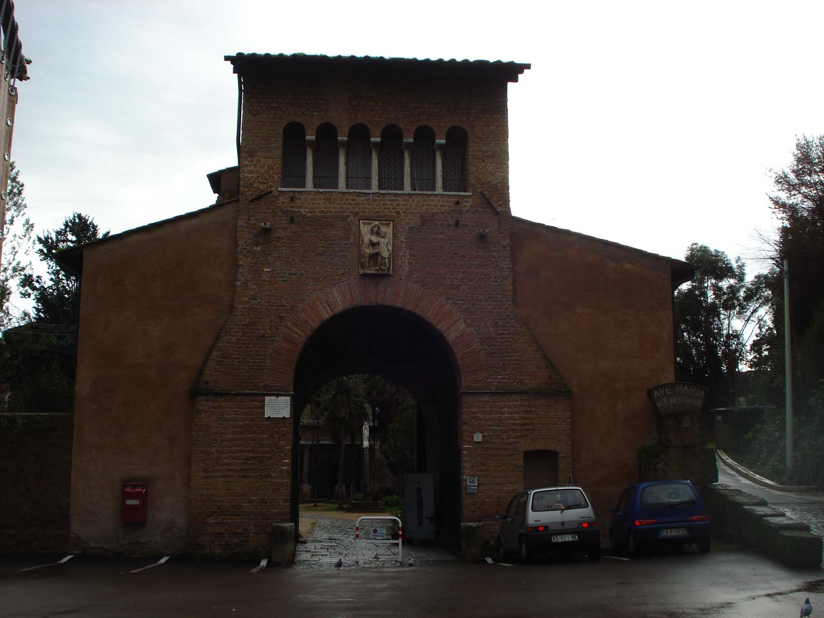 Arca di Carlo Magno (Abbazia di Tre Fontane, Roma)